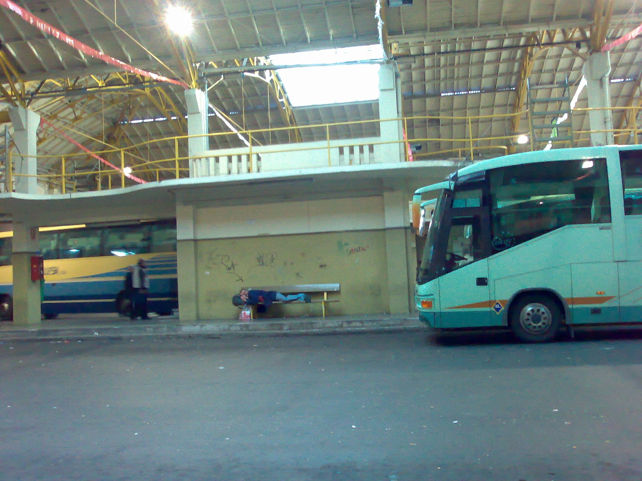 Iruñeko autobus geltoki zaharra.